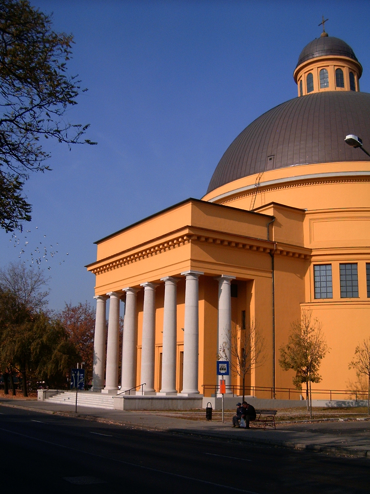 Prohászka templom, Székesfehérvár. Épült 1929 és 1933 között Fábián Gáspár tervei szerint Photo by Arpad Horvath, 2005